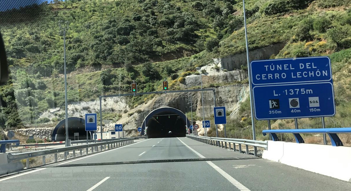 Autopista del Guadalmedina AP-46 Málaga España